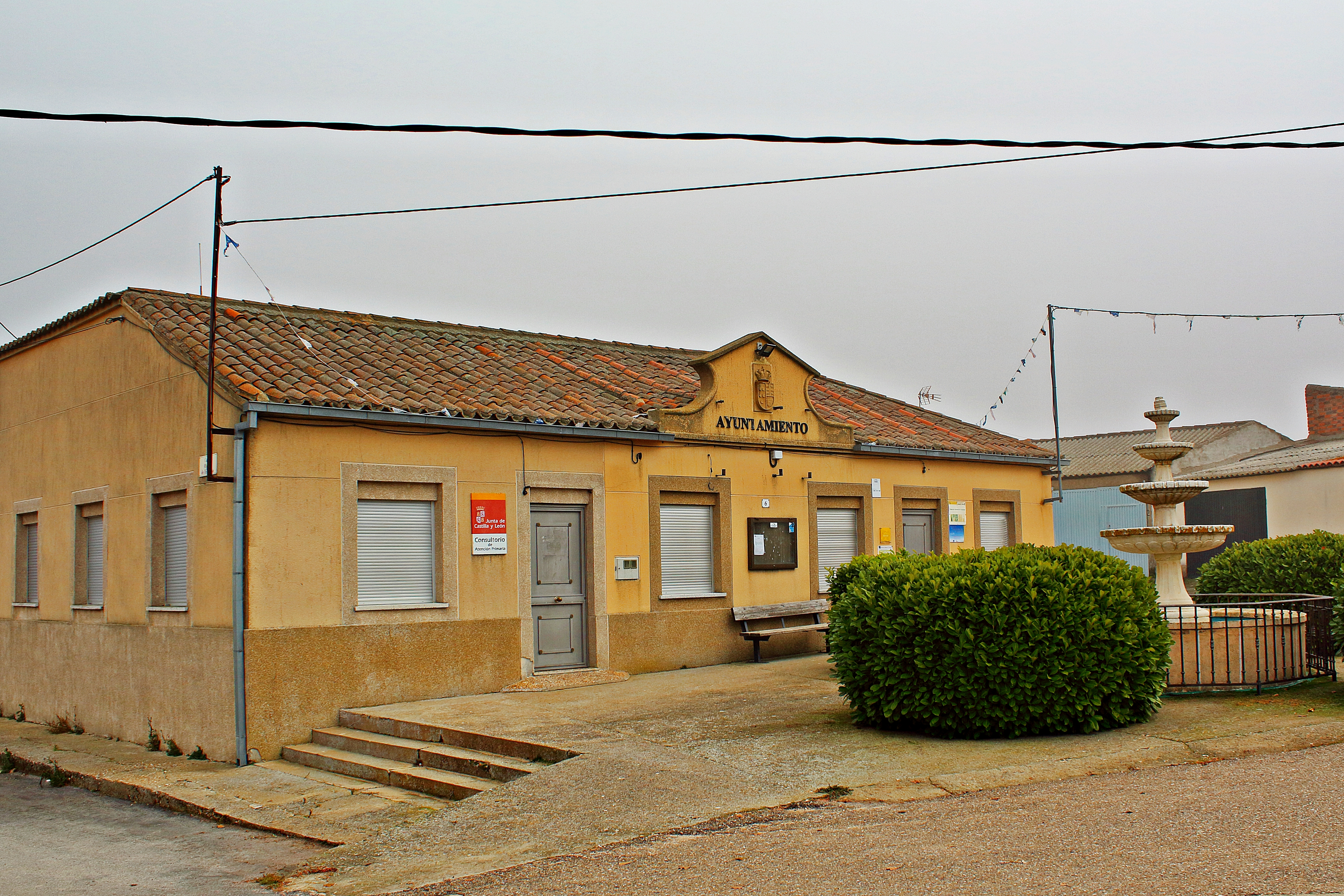 El Pedroso de la Armuña municipio de la comarca de La Armuña, provincia de Salamanca.